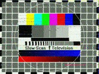 Testovací snímek Slow-scan television, tzv. monoskop, který přijal na kmitočtu 14,230 MHz uživatel Bruxy -- radioamatér se značkou OK2MNM.